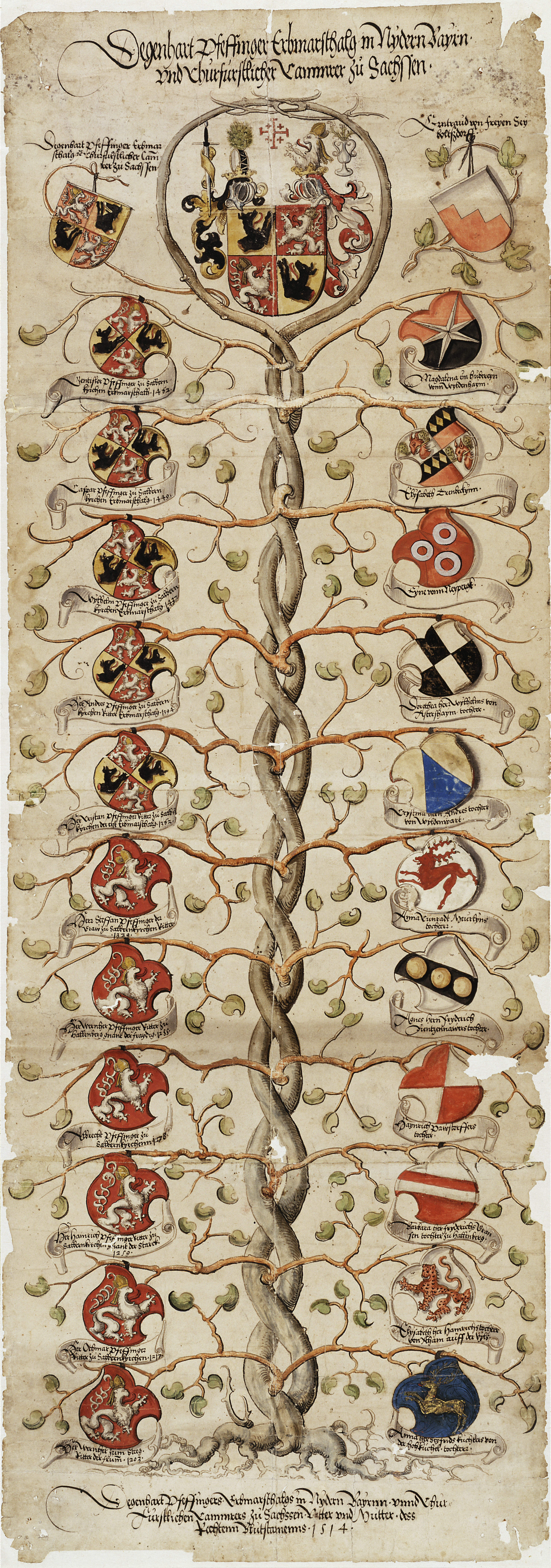 Stammbaum der Pfaffinger zu Salmanskirchen